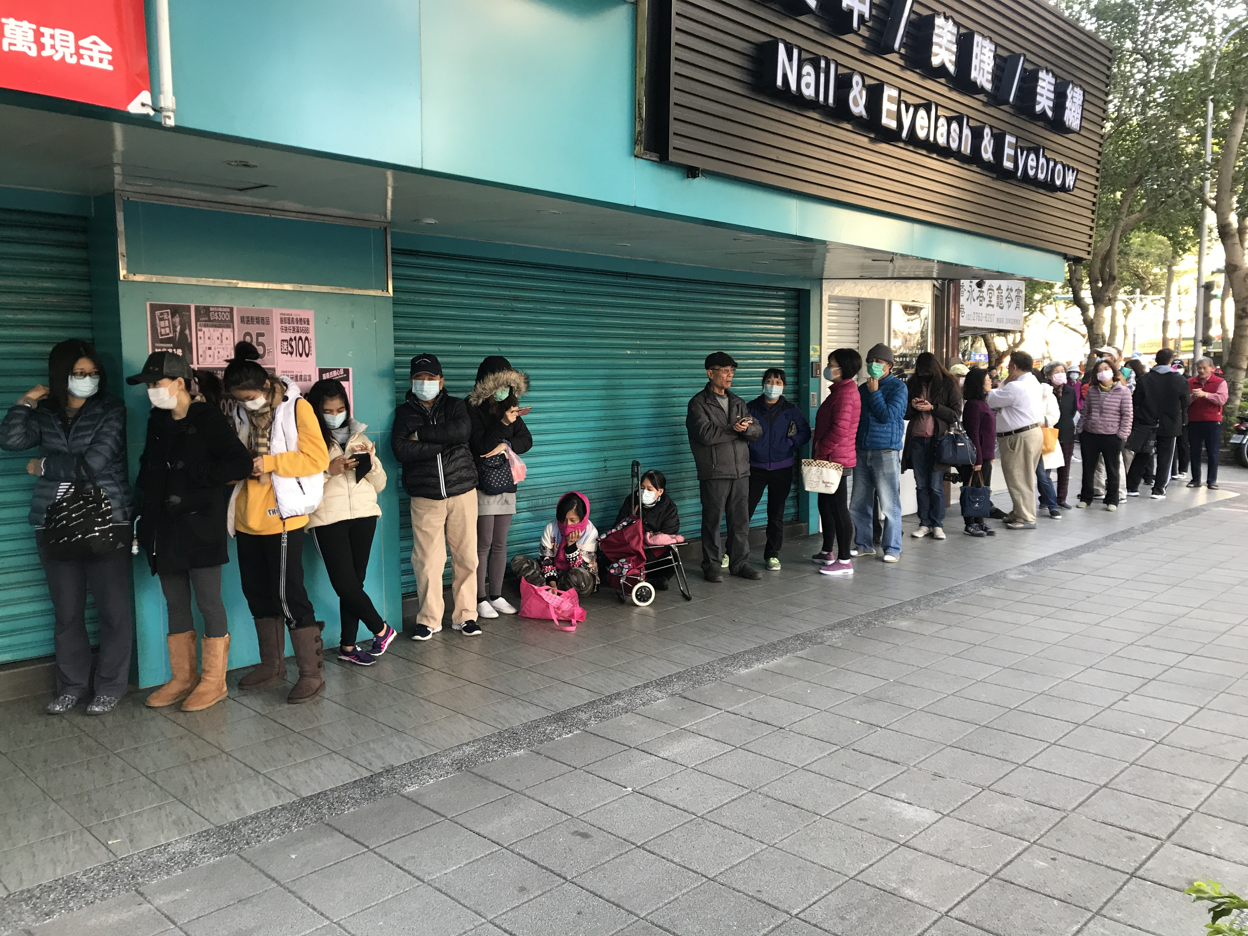 2020年2月2日上午9時40分，新型冠狀病毒肺炎大流行期間，屈臣氏民環門市（臺北市松山區富泰里民生東路五段188號）外排隊買口罩的民眾。